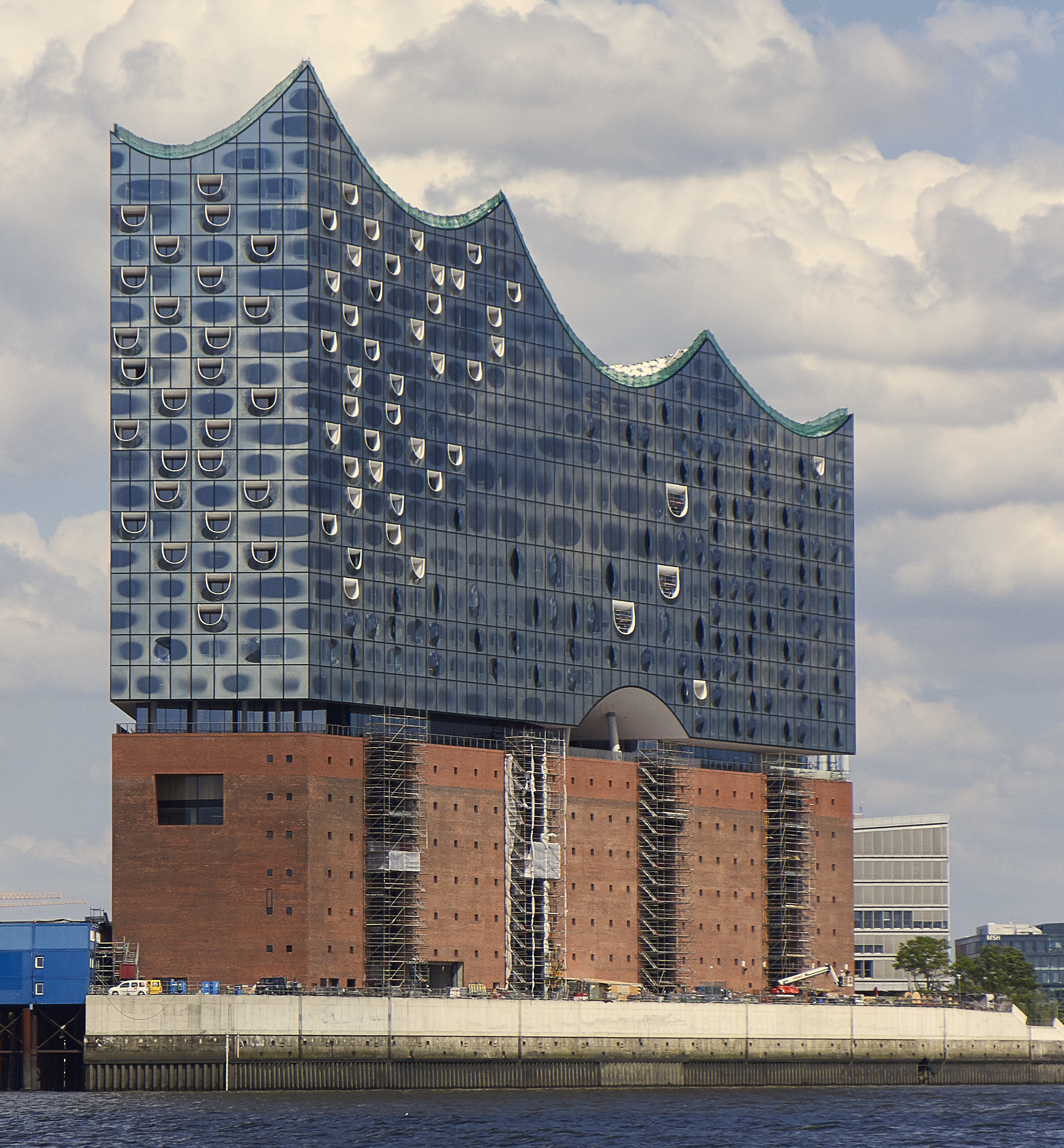 Die Elbphilharmonie ohne Baukräne - am 21.07.2015.